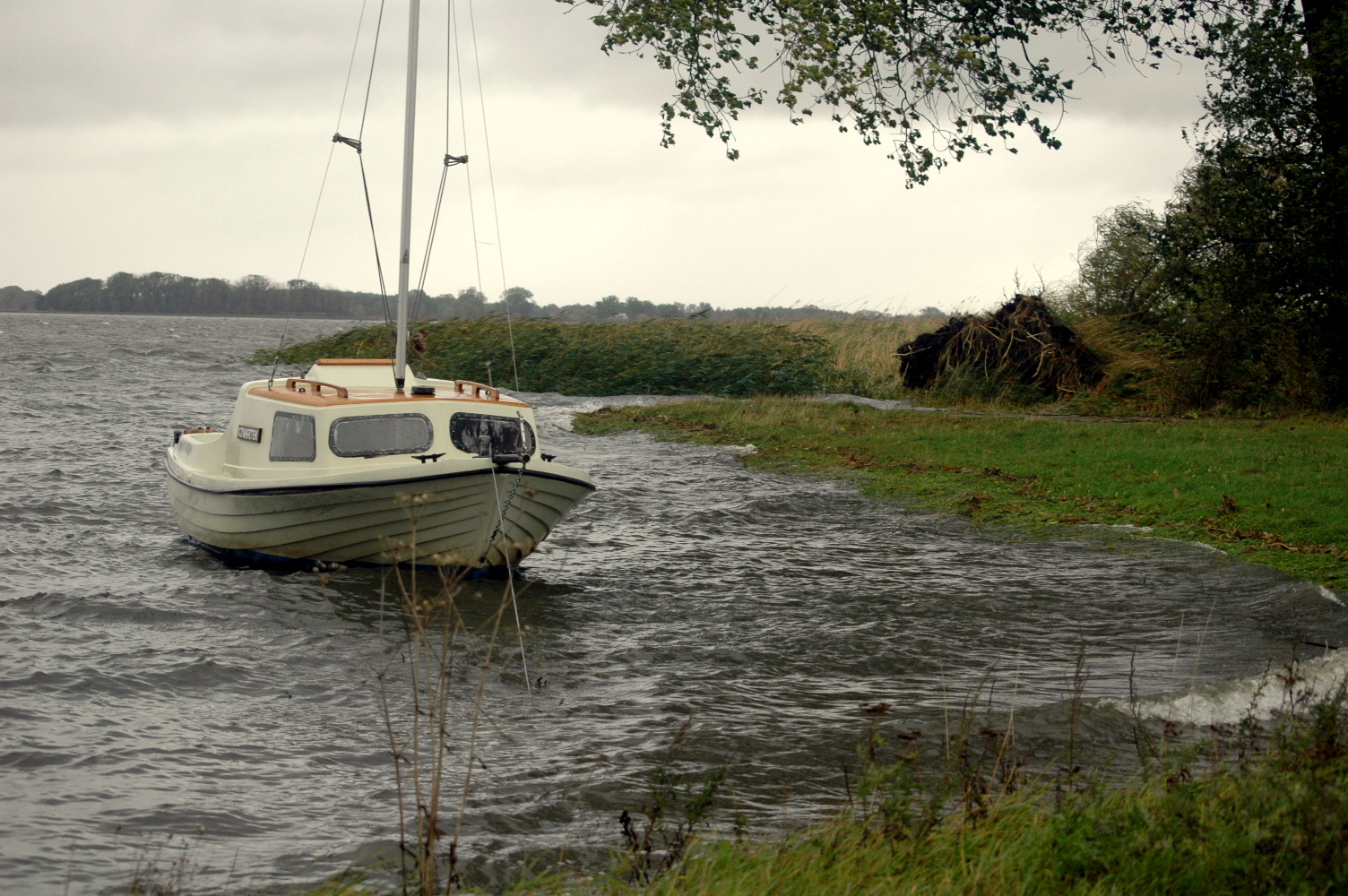 Port Sierosław podczas cofki w 2009 roku.